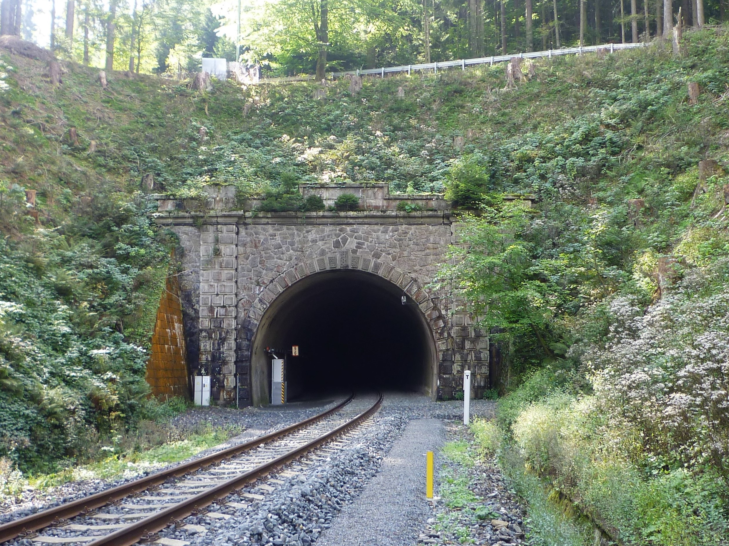 Špičácký tunel - severní portál